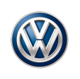 Logo de VW a partir del año 2000